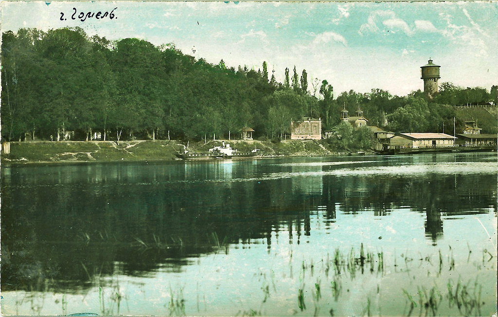 Беларуская (тарашкевіца): Гомель (Homiel), рака Сож (Sož). Месца, дзе знаходзіўся замак